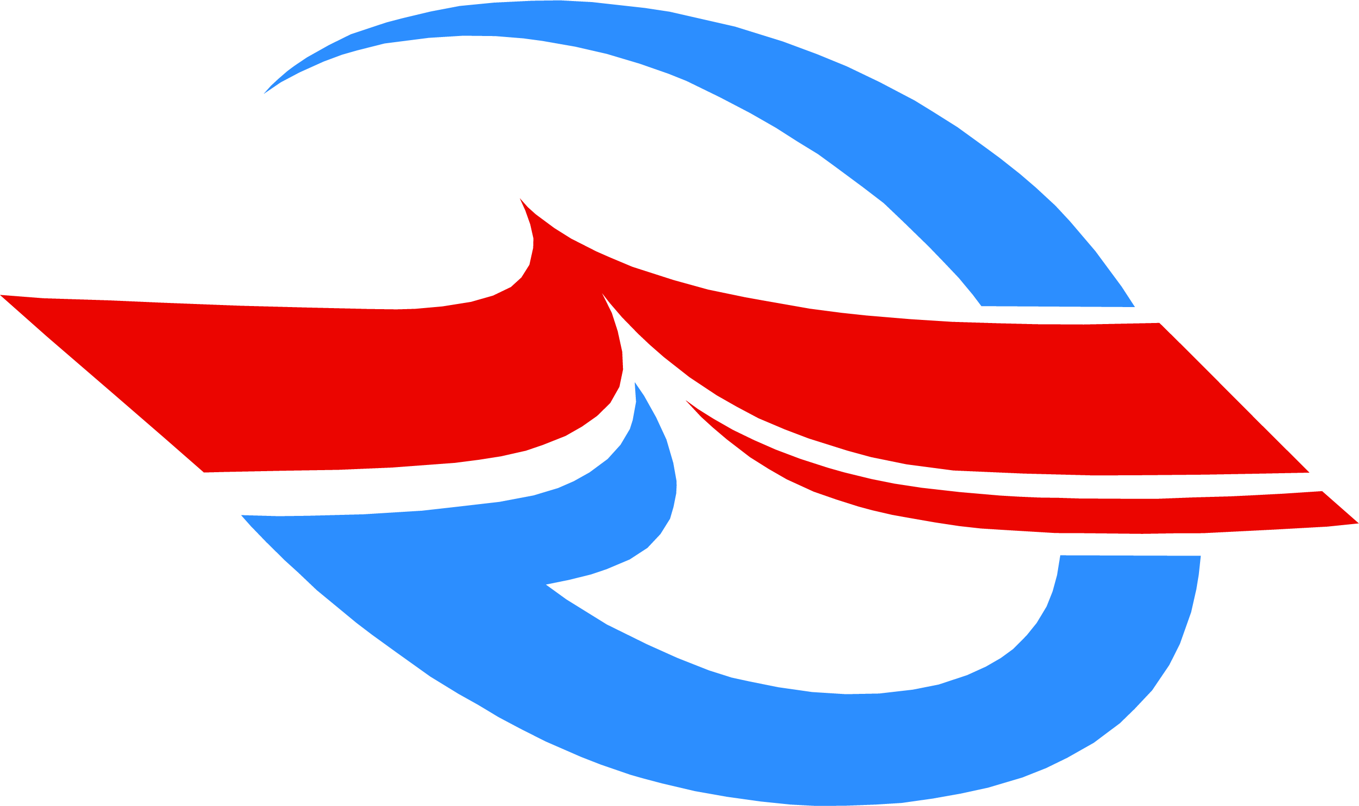 自制合肥公交集团logo，非官方logo